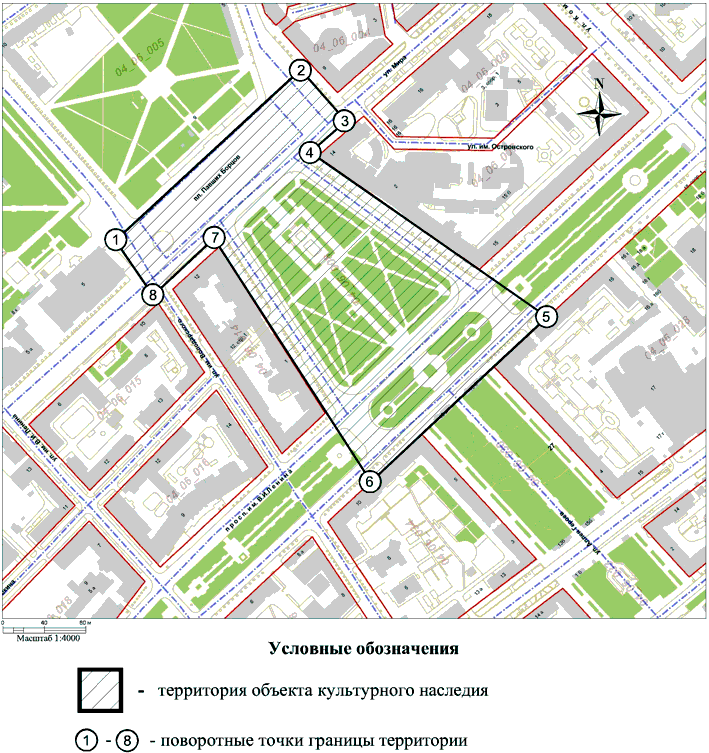 Памятное место, где 31 января 1943 г. войска Донского фронта под командованием генерал-полковника Рокоссовского Константина Константиновича завершили разгром южной группы войск фашистской Германии, окруженной в районе Сталинграда, и водрузили Красное знамя Победы.